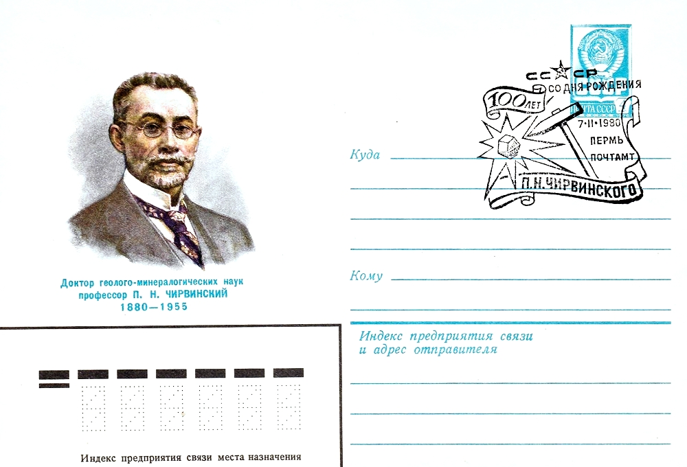 Юбилейный конверт. Чирвинский Пётр Николаевич, 1880-1955, 100 лет со дня рождения.